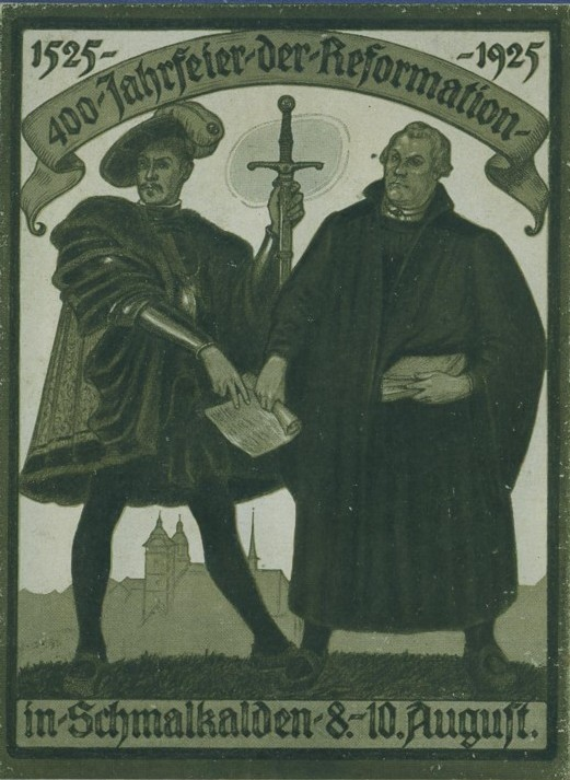 Postkarte zum Jahrestag des Schmalkaldenbundes